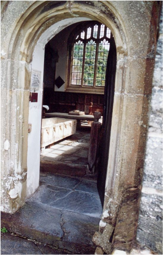 Porth, gyda chreiriau Llywelyn; Llanrwst Hawlfraint: Llywelyn2000 2000 - 2009